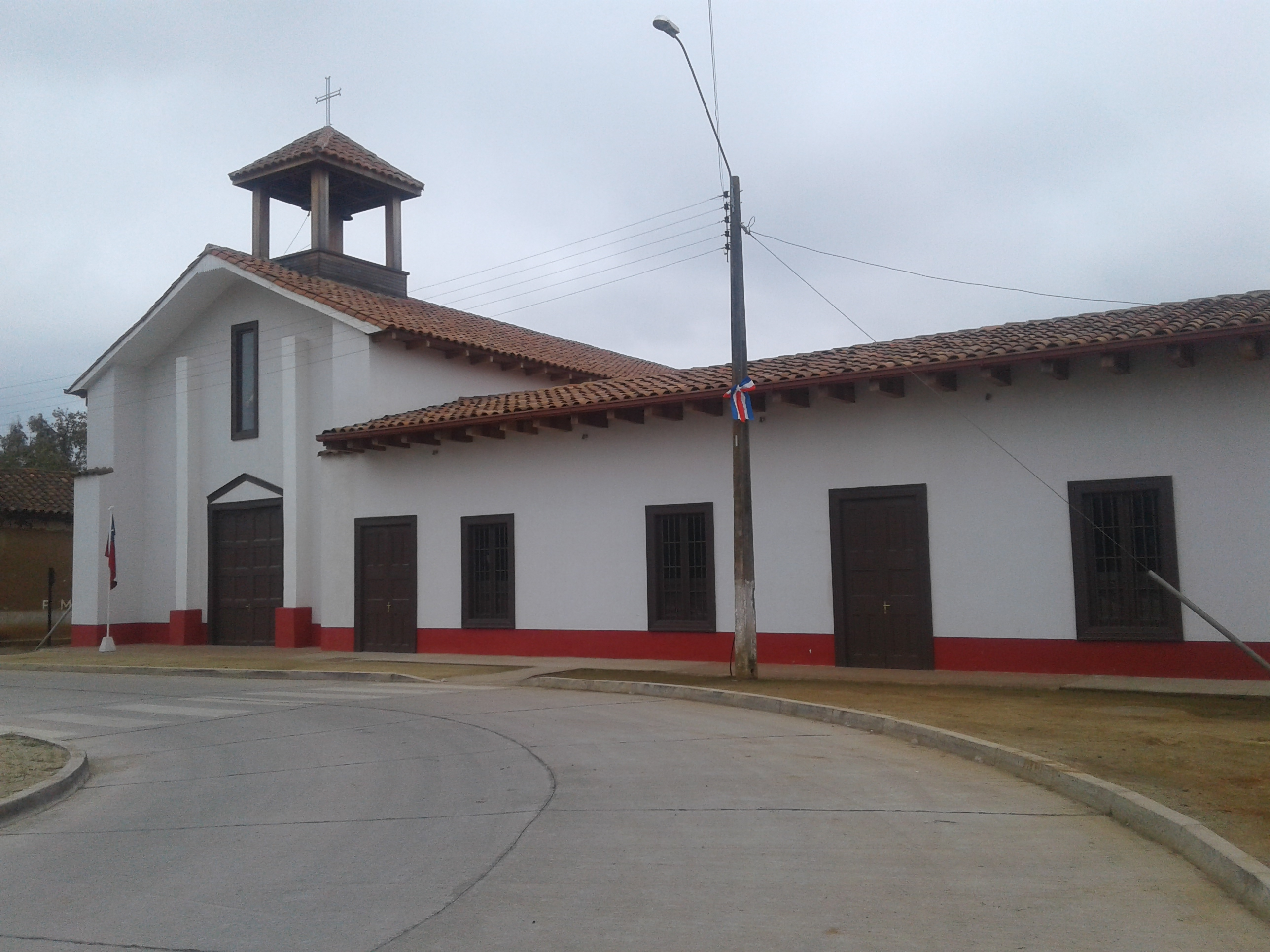 Parroquia Sagrado Corazón de Jesús de Gualleco, restaurada después del Terremoto de 2010.